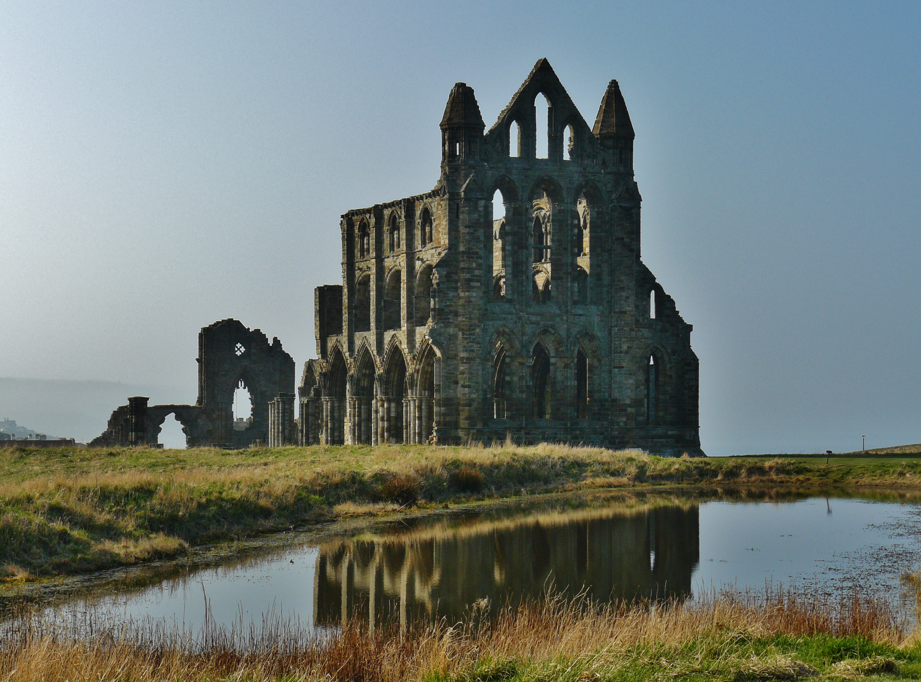 Руїни Абатства Уітбі, Північний Йоркшир, Англія